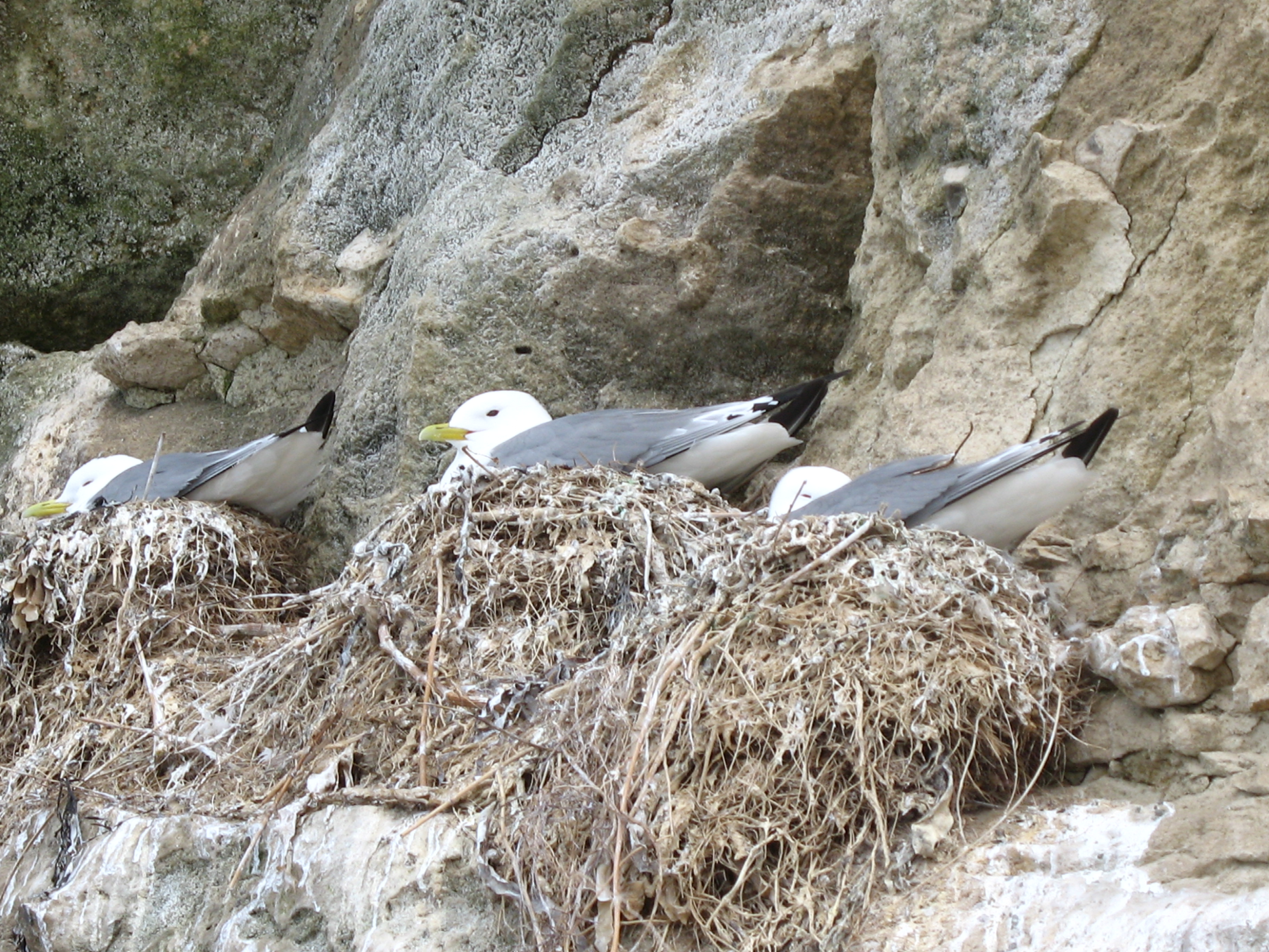 Brutkolonie der Dreizehenmöwe am Bulbjerg in Jütland, Dänemark